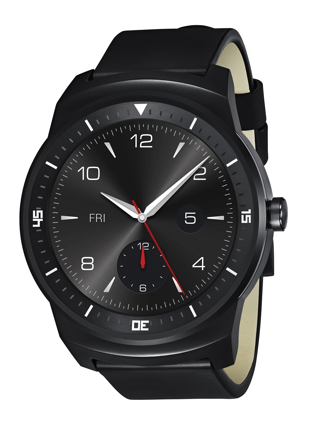 LG전자, 전략 스마트워치 ‘LG G워치R’ 전격 공개 ■ 완벽한 원형 디자인 적용한 프리미엄 스마트워치 □ 세계 첫 원형 플라스틱 OLED 적용…가볍고 얇아 □ 메탈바디, 천연 가죽 소재의 스트랩 선택 ■ 최적화된 하드웨어, 직관적이고 편리한 UX 탑재 □ 1.2GHz 퀄컴 스냅드래곤 400 프로세서, 410mAh 대용량 배터리 등 □ 심박센서로 건강관리 정보 제공 ■ 사용자 편의성 혁신 □ 음성 인식 기반 ‘구글 나우’, 화면이 꺼지지 않는 ‘올웨이즈 온’, 방수 및 방진 기능, 교체 가능한 스트랩 등 ※ Social LG전자 ( 에서 관련 보도자료를 확인하실 수 있습니다.